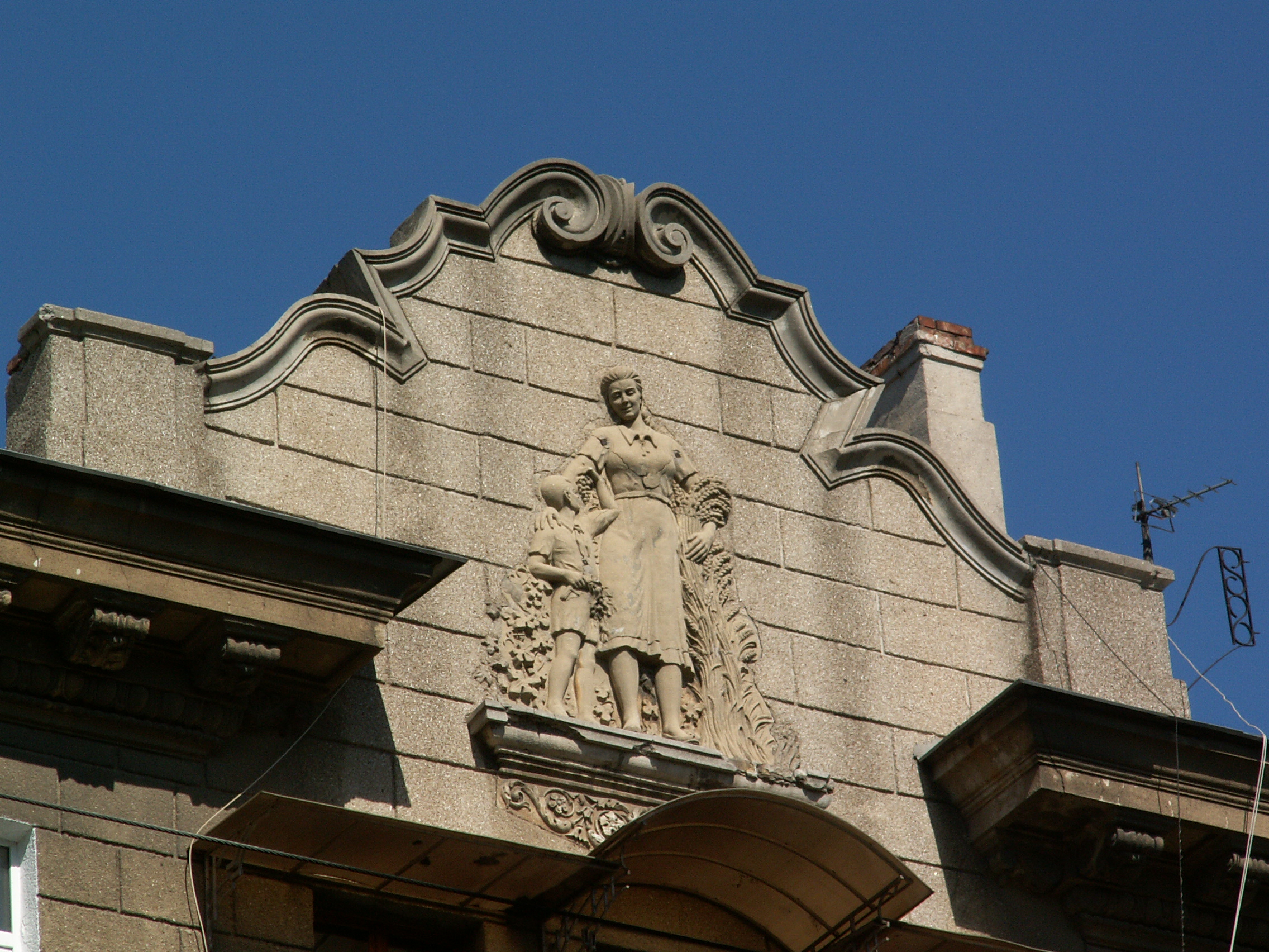 Барельеф на здании. Соцреализм.